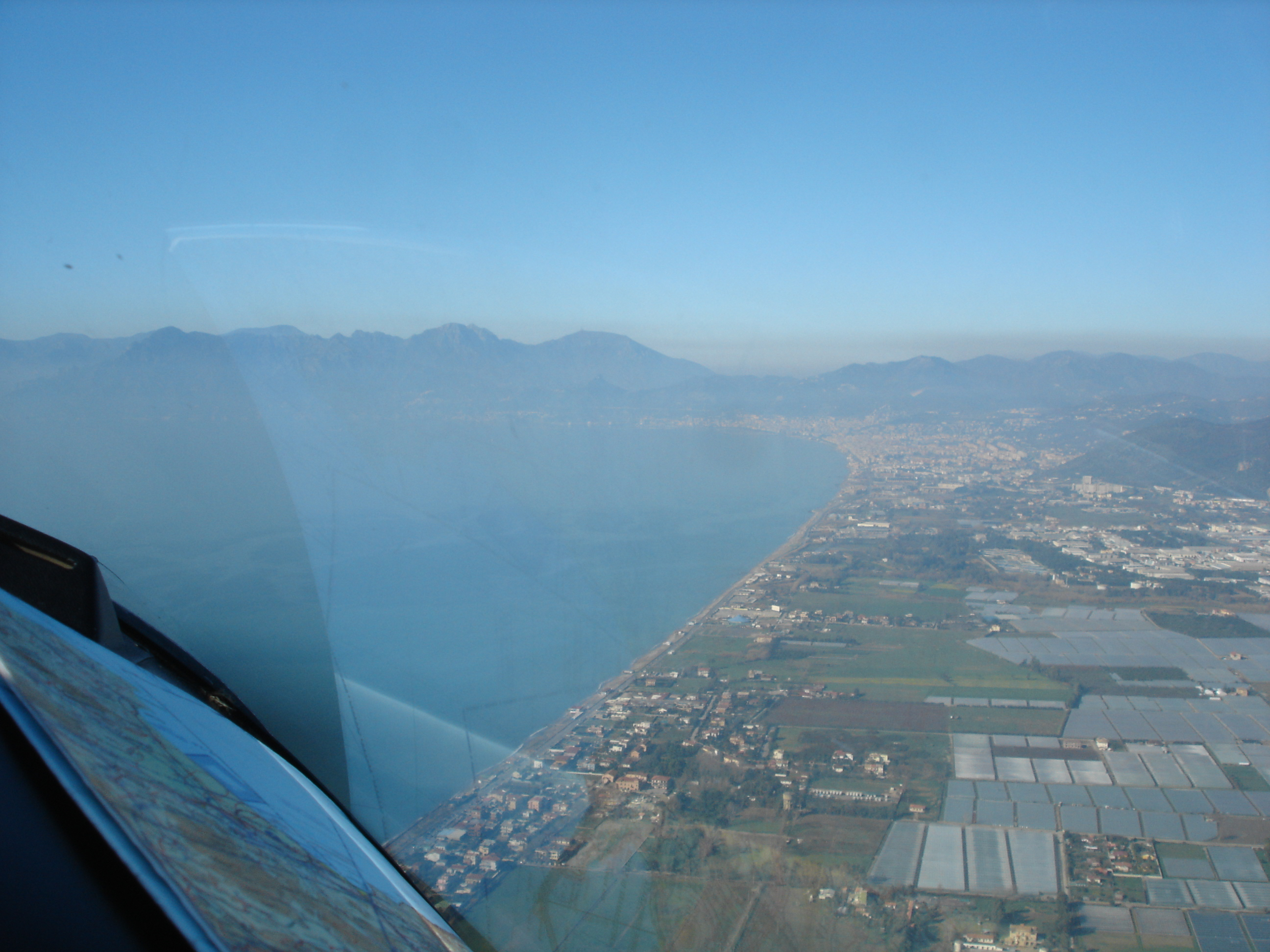 20 gennaio 2008: volo Salerno Pontecagnano (LIRI)-aviosuperficie di Sabaudia a bordo del Tecnam P2002 I-FADA